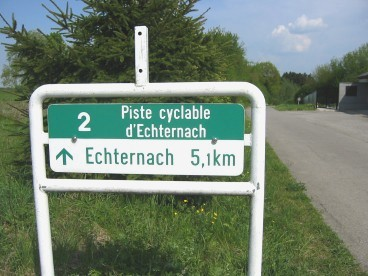 Ufank vun der Iechternacher Velospist um Scheedgen.